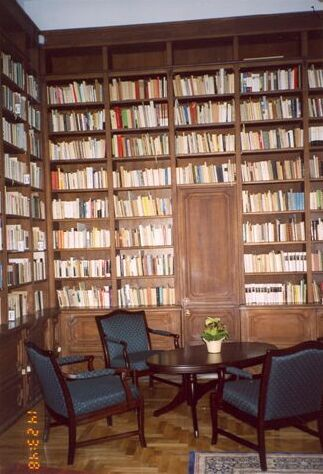 Illyés Gyula Archívum és Műhely. - Budapesten, a VI. kerületben a Teréz krt. 13. számú épület első emeletén[1]